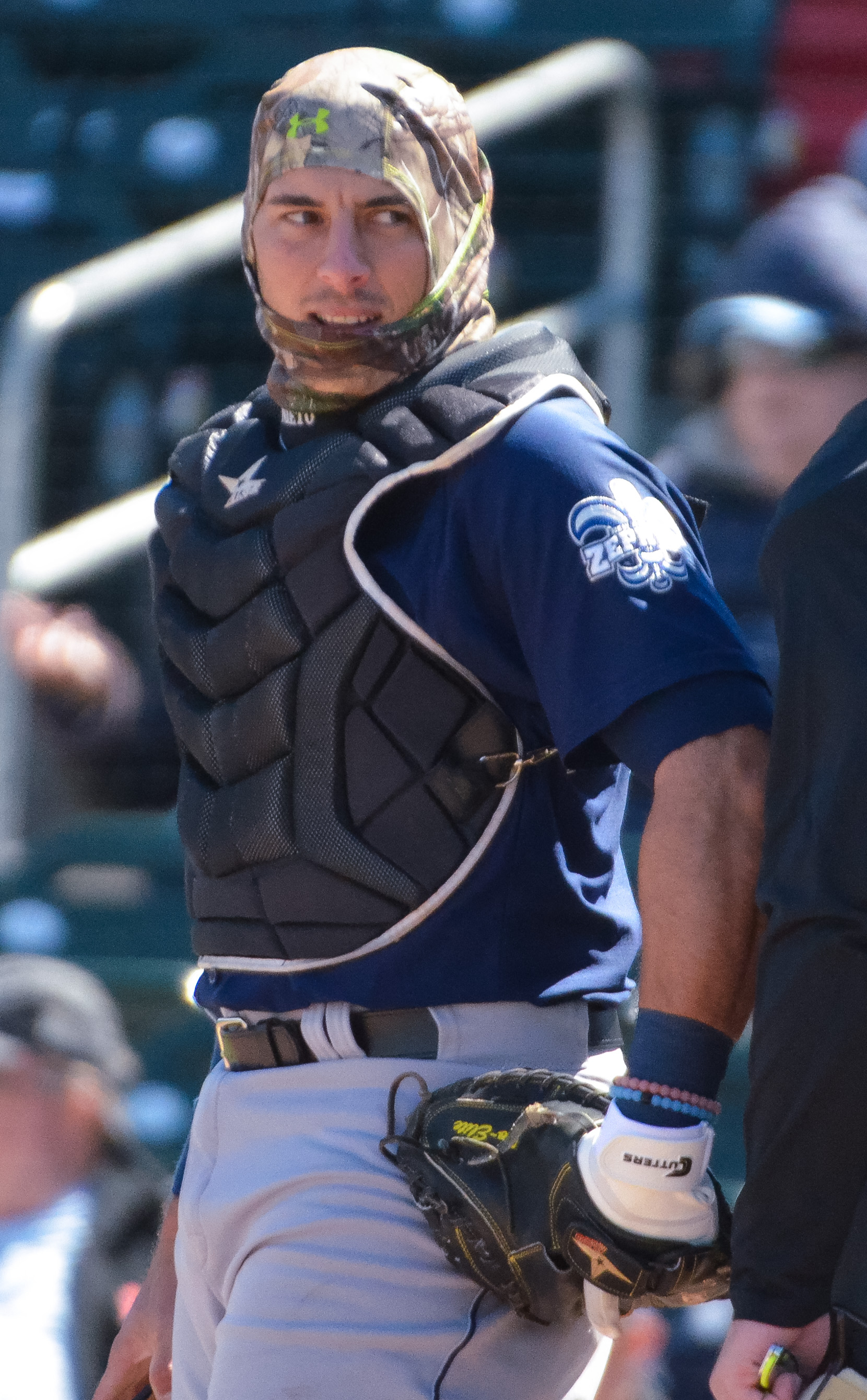 Adrián Nieto